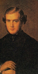 D.Jorge Loring y Oyarzábal, I Marqués de Casa Loring (1822-1900)